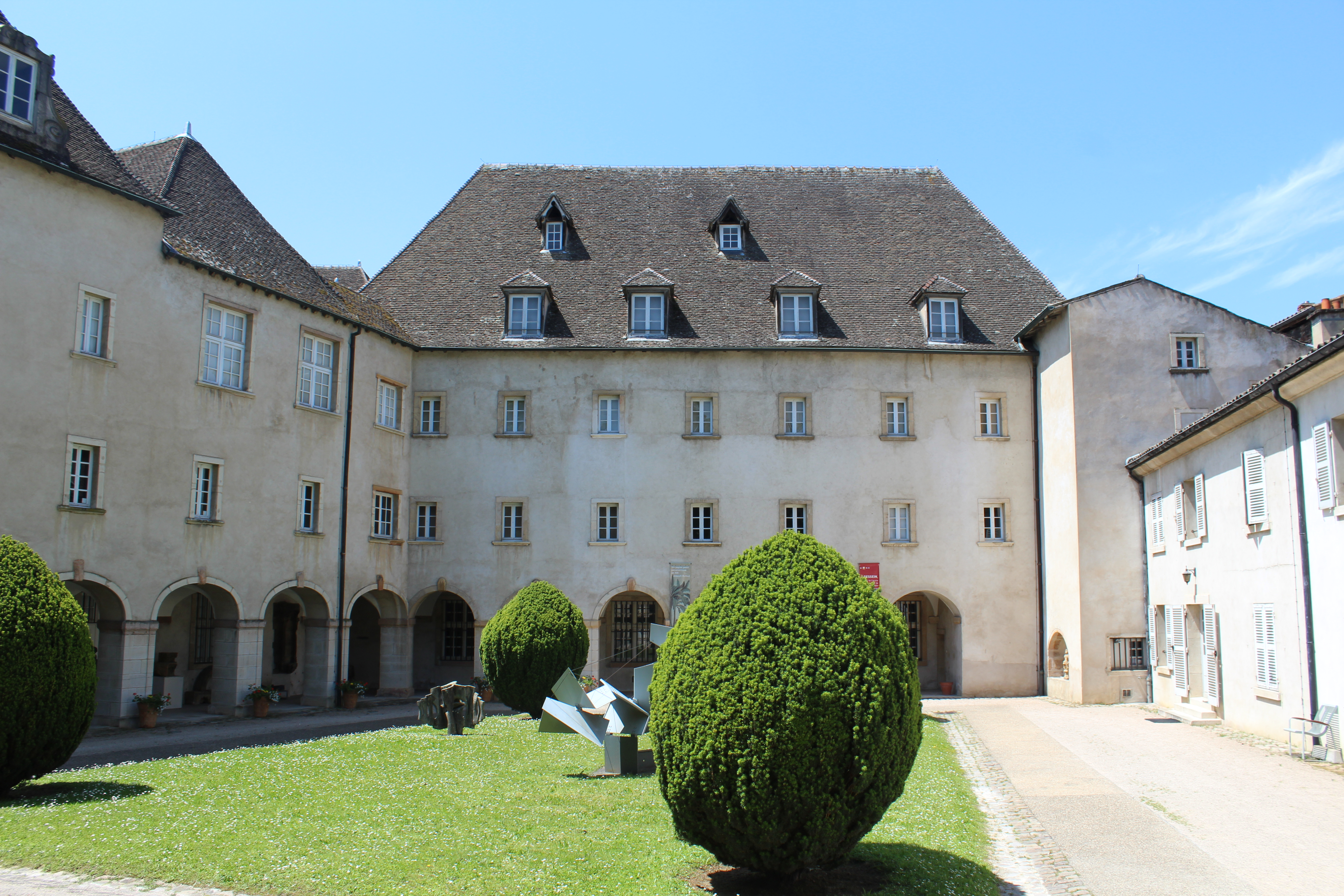 Le musée des Ursulines à Mâcon.